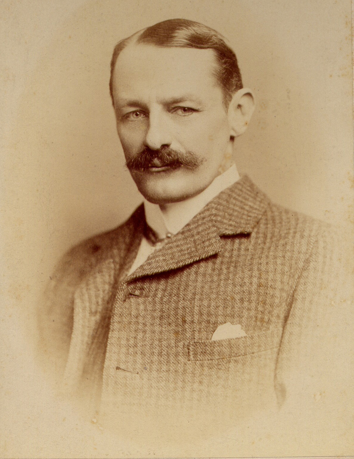 Portrait Of William Adolf Baillie Grohman (1851-1921) taken in 1885. See William_Adolf_Baillie_Grohmann.